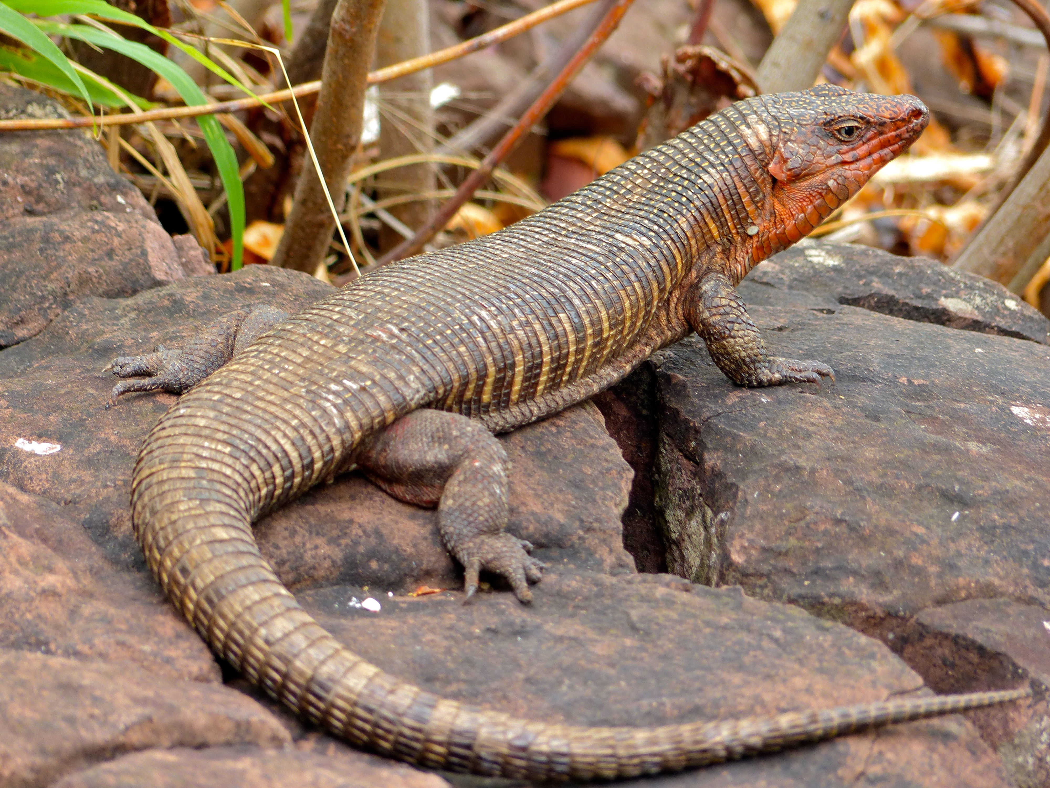 Bungalow N°51, Mopani Camp, Kruger NP, SOUTH AFRICA